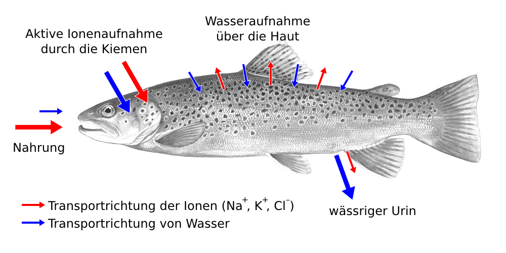 Osmosereguation bei Fischen